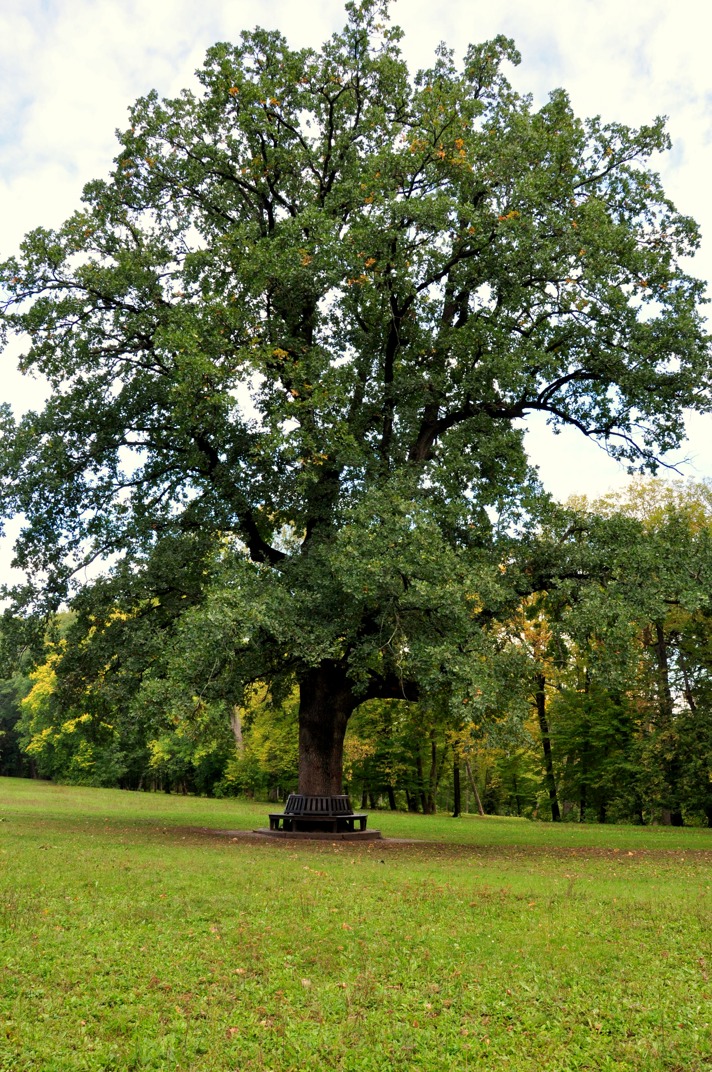 7.4. Дуб Залізняка, Умань, вул. Садова, 55 (парк «Софіївка»)